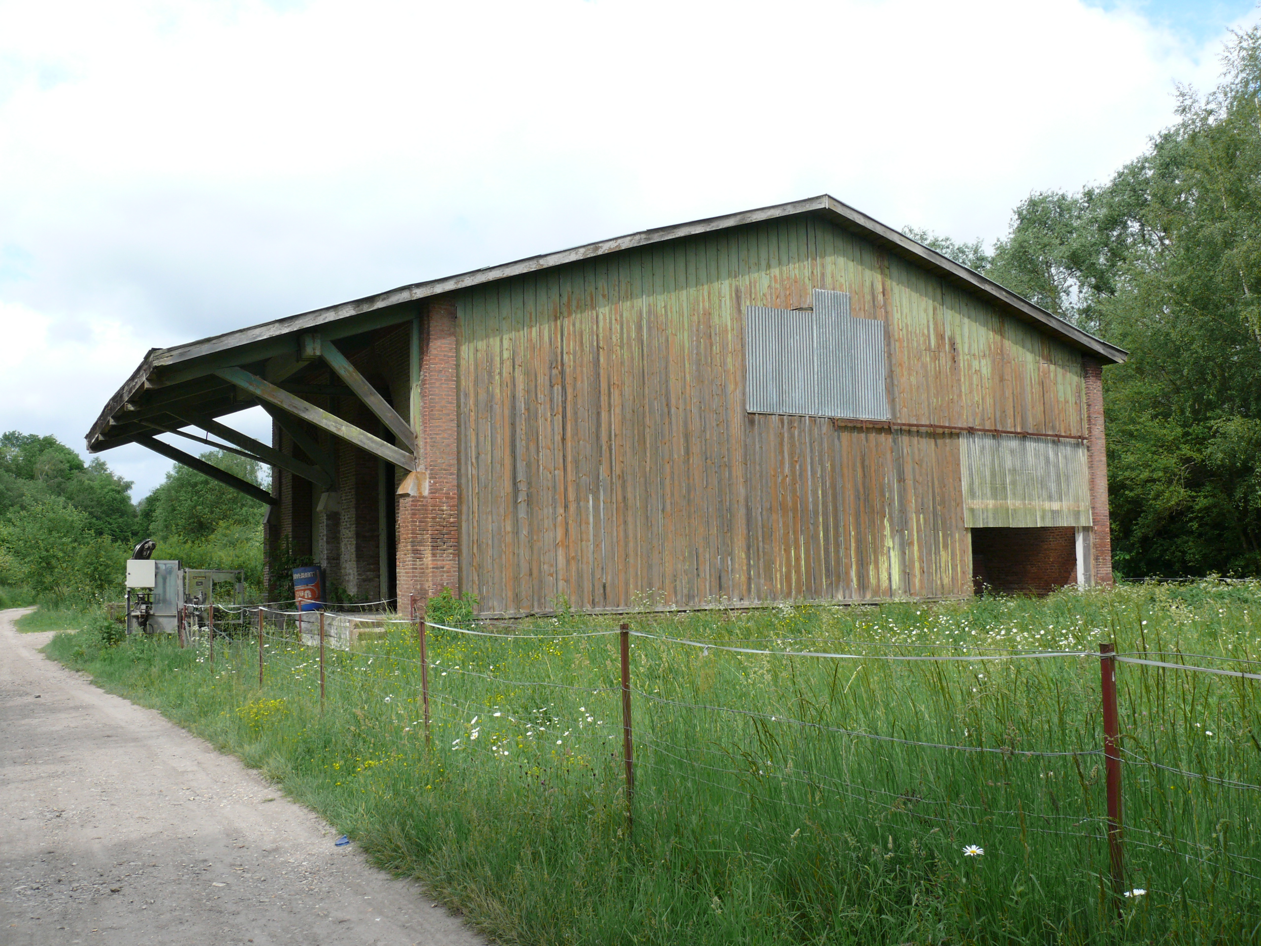 Fontaine-Bonneleau : La halle marchandise de l'ancienne gare de la Ligne Beauvais - Amiens, implantée près de l'usine d'embouteillage des eaux minérales.